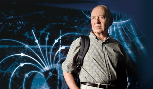 פרופסור לפיזיקה יוסף אמרי